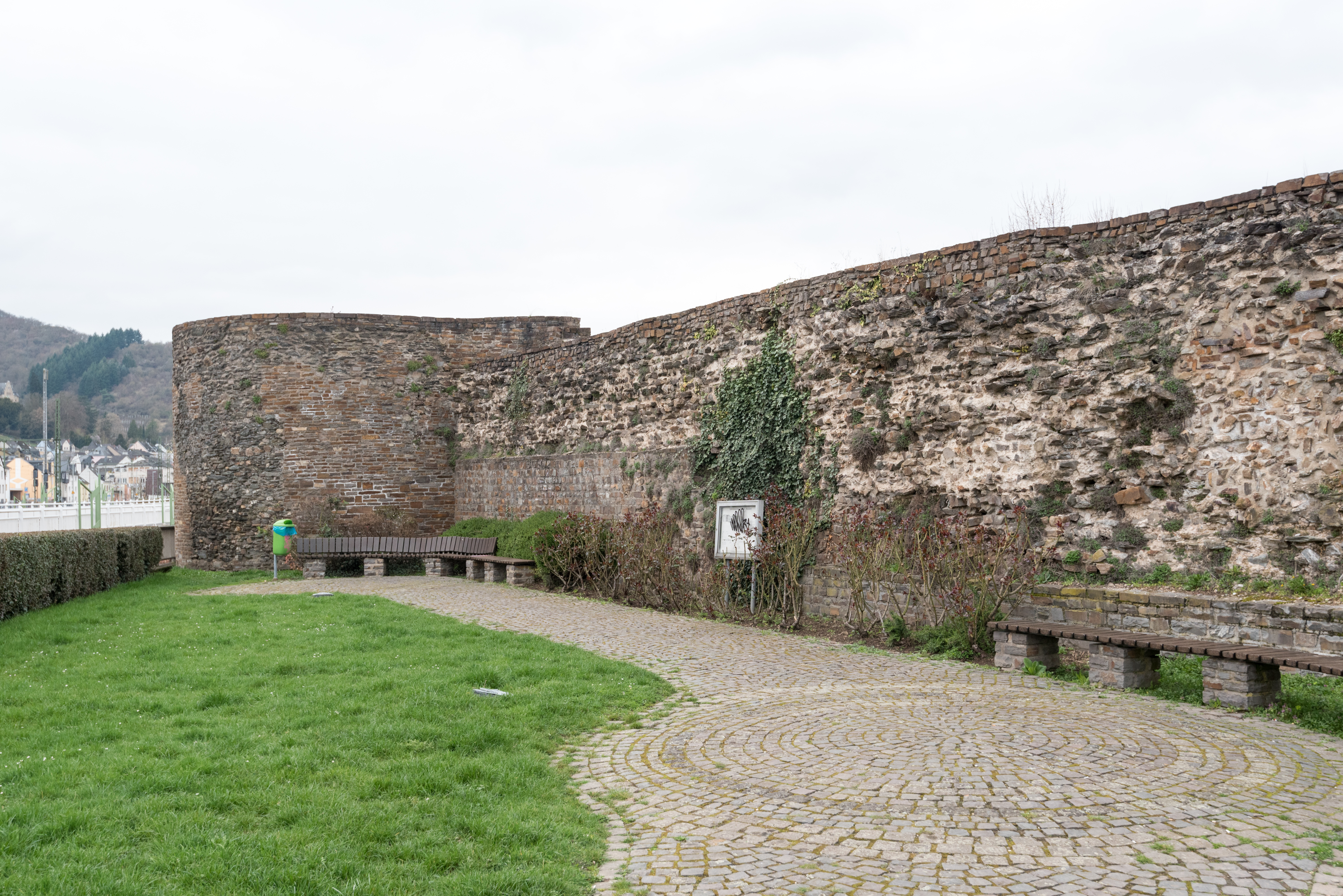 Boppard, Römisches Kastell